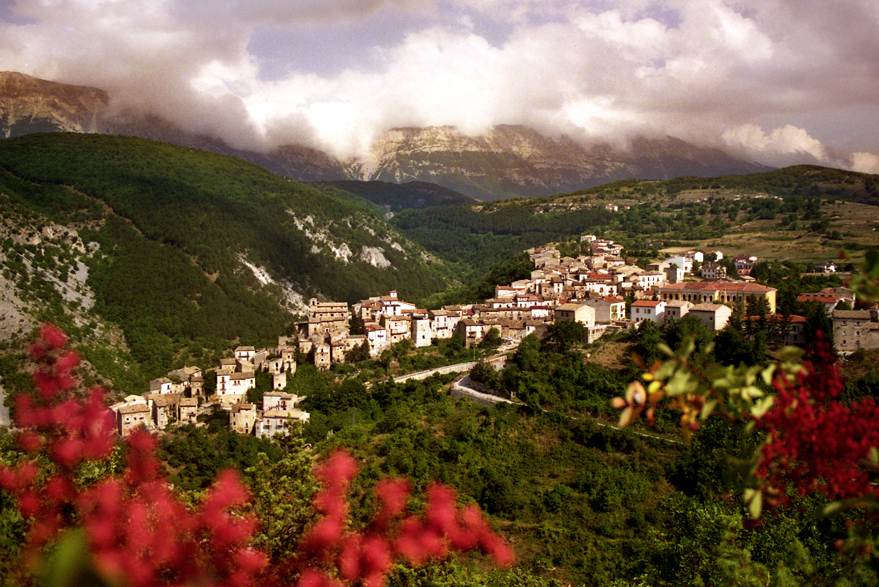 Cansano ph G.Guadagnoli